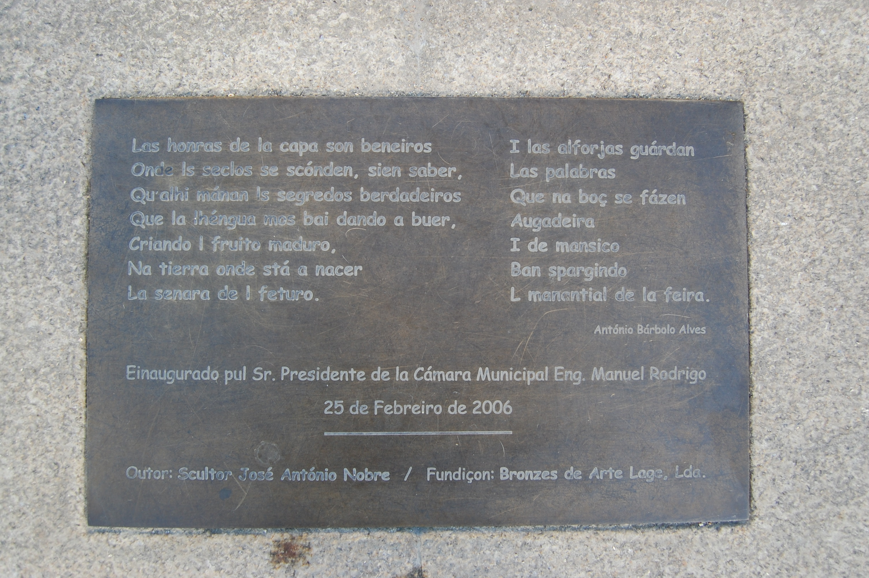 Placa de identificação de rua em mirandês (Miranda do Douro, Portugal.)